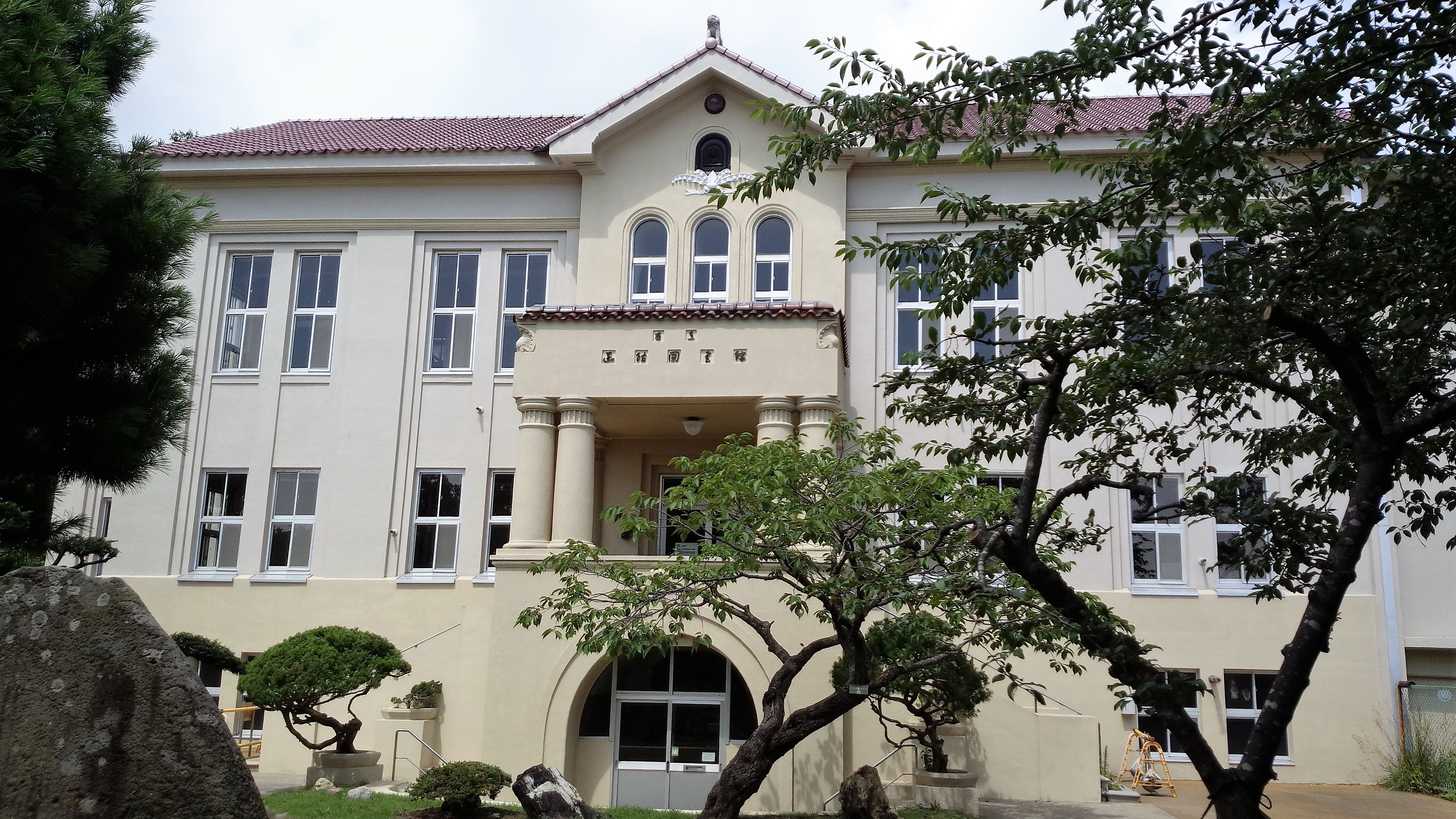 市立函館図書館旧本館（函館公園内、2014年8月）